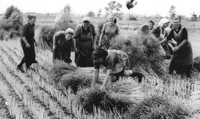 LPG Wehlitz, Aufstellen von Garben ZB-7.7.1956 Die Ernte hat begonnen. 42 Morgen Winterraps haben die Genossenschaftsbauern der LPG "Thomas Müntzer" in Wehlitz, Krs. Burg, bereits mit dem Binder der MTS gemäht. Die Genossenschaftsbauern rechnen mit einer guten Rapsernte. UBz: Die Genossenschaftsbäuerinnen beim Aufstellen des Rapses. Anmerkung an Redaktionen: Wegen der Wichtigkeit des Themas haben wir un entschlossen, dieses Bildmaterial eines Fotoamateurs in den Dienst zu geben.